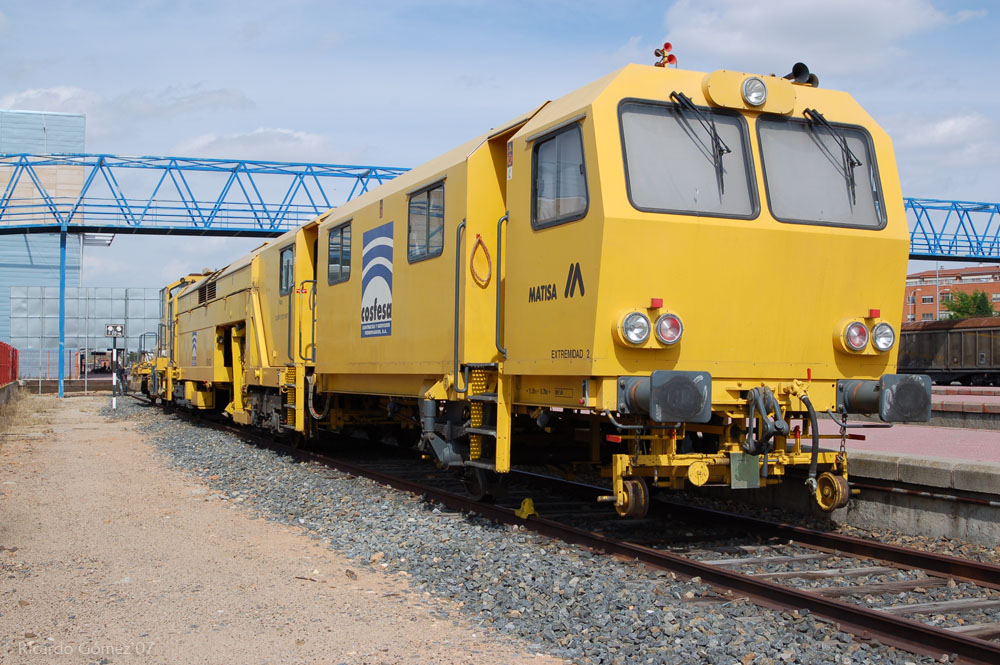 Bateadora Matisa en la Estacion de Salamanca